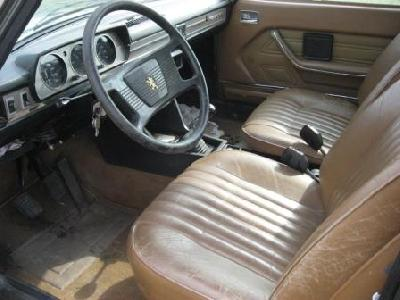 Peugeot 504 innen auf einer Oldtimer Rally in Belgien. Bild stammt aus einem englischen Modell, was ich gedreht habe für kontinentaleuropäischen Character (siehe Zündschloss).